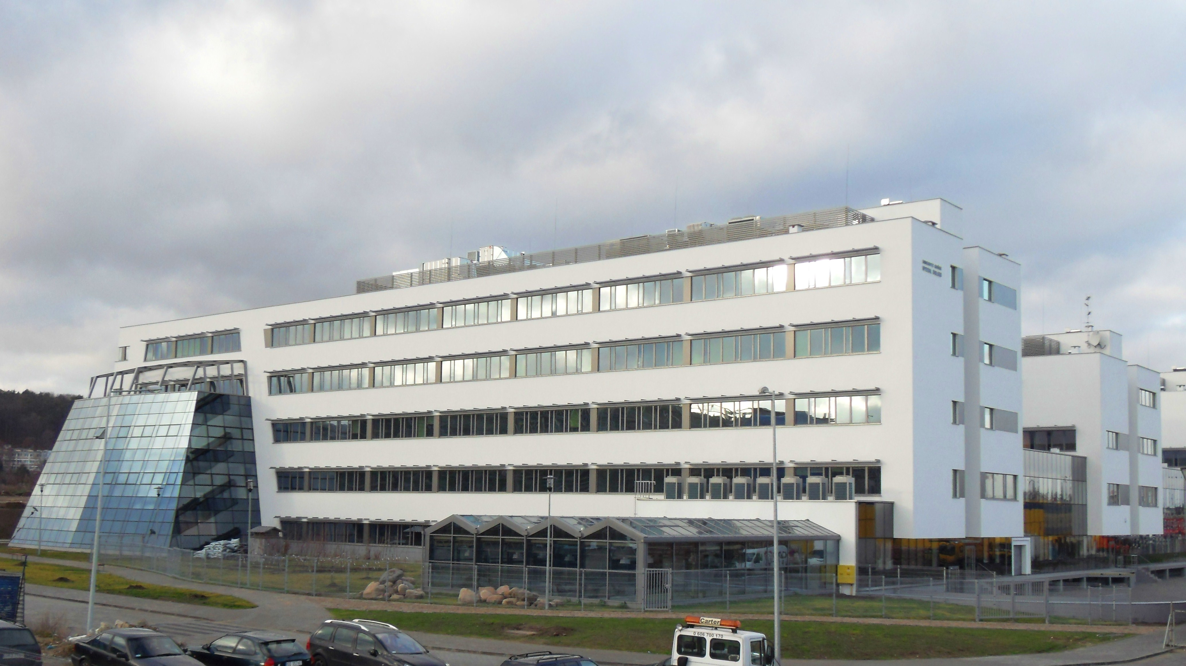 Gdańsk Oliwa. Uniwersytet Gdański, Wydział Biologii.